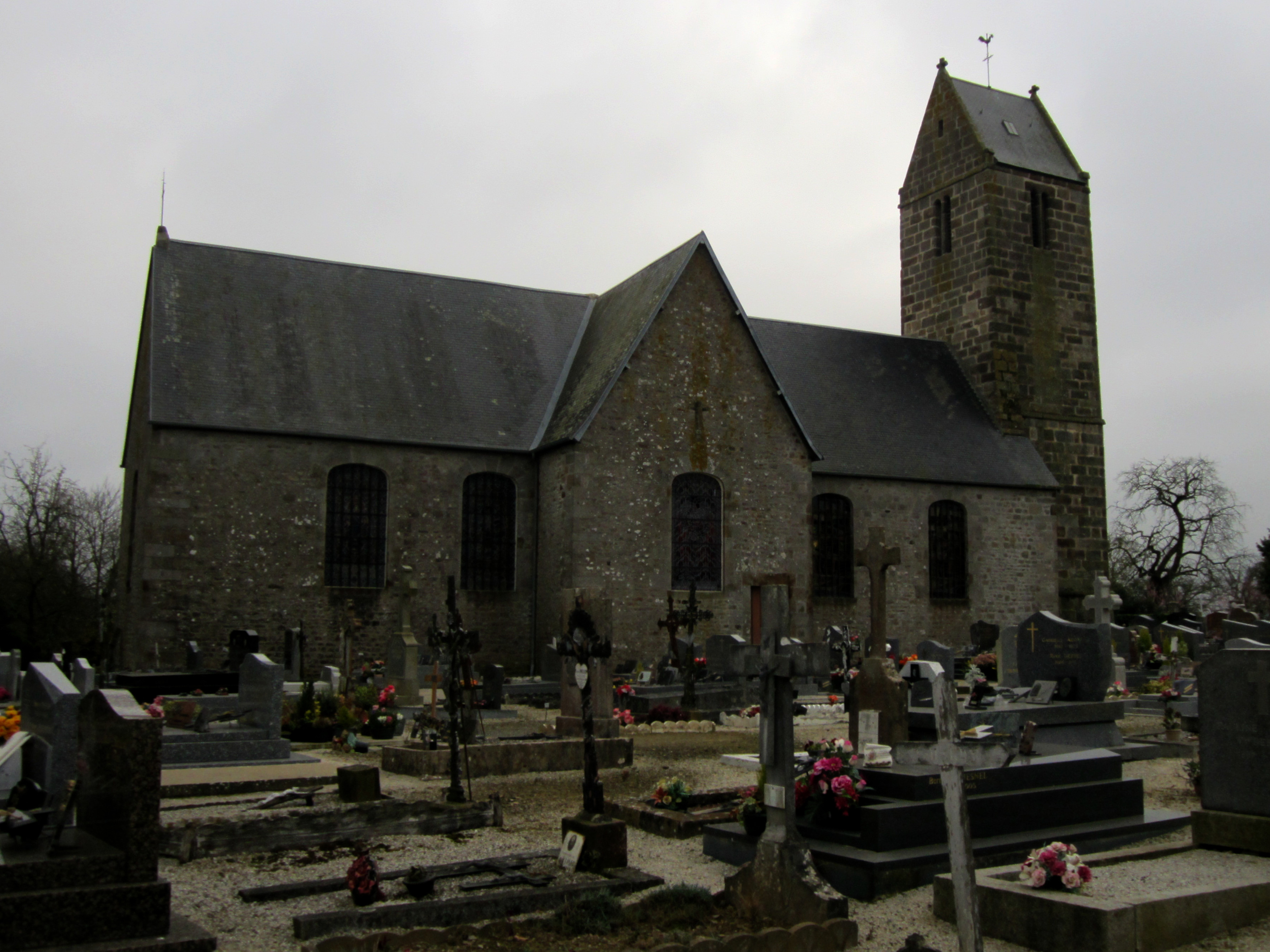 Saint-Georges-de-Livoye, Manche